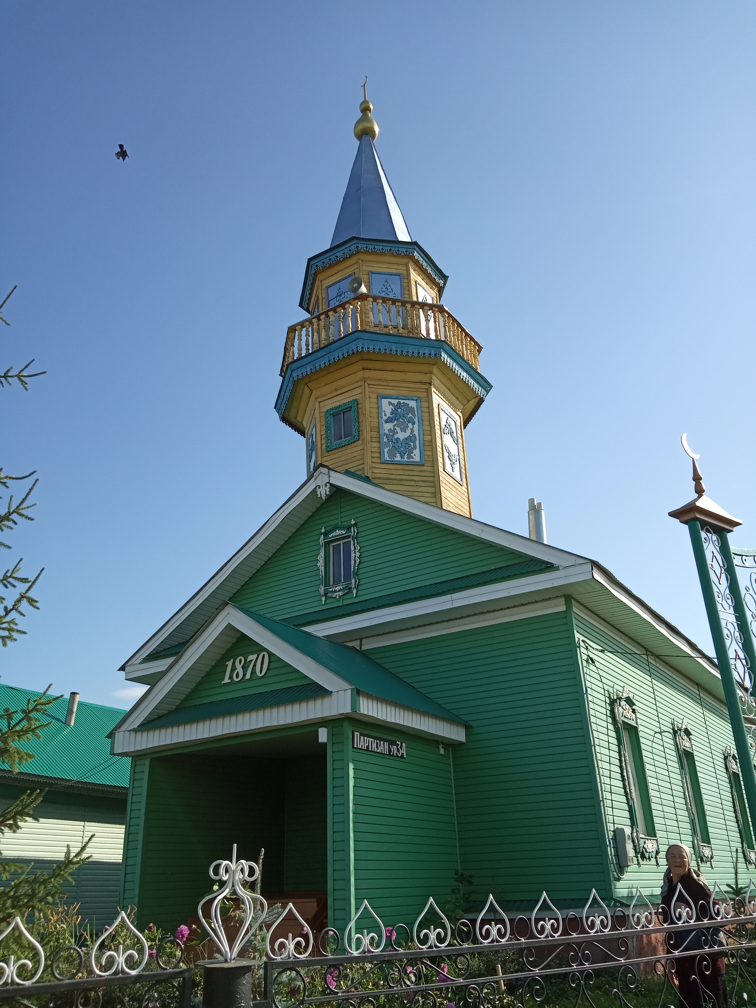 Башҡортса: Башҡортостан Республикаһы